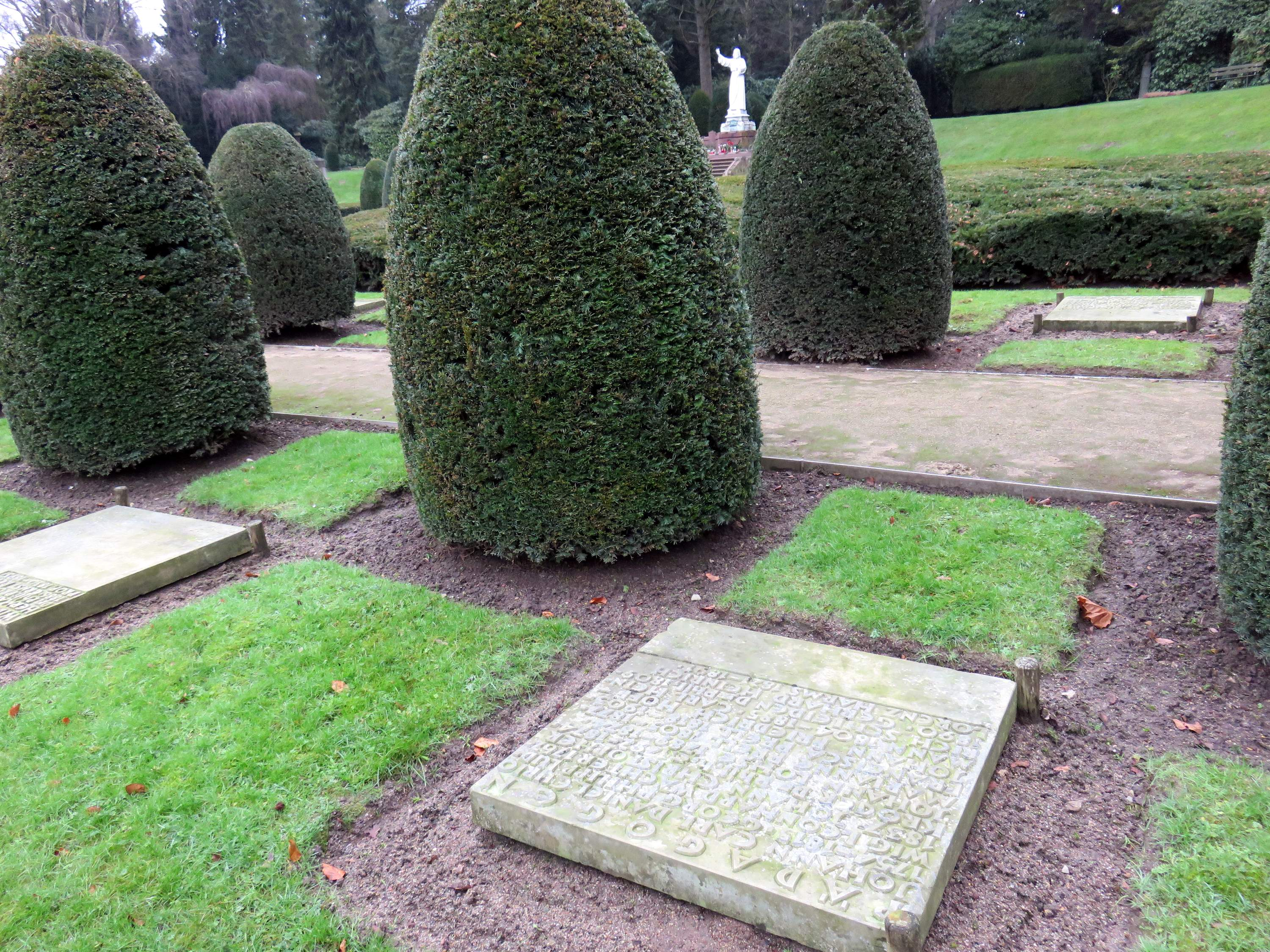 Sammelgrabmal Pädagogen im Bereich des Althamburgischen Gedächtnisfriedhofs auf dem Hamburger Friedhof Ohlsdorf, südöstliche Querachse, zu Ehren von unter anderen Johann Carl Daniel Curio, Johann Christopher Kröger, Carl Heinrich Schleiden.